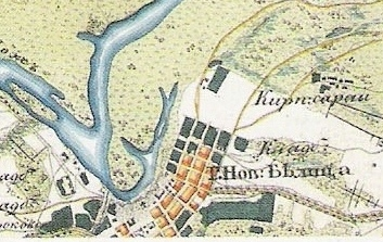 Беларуская (тарашкевіца): Гомель (Homiel), плян мястэчка і мапа ваколіцаў